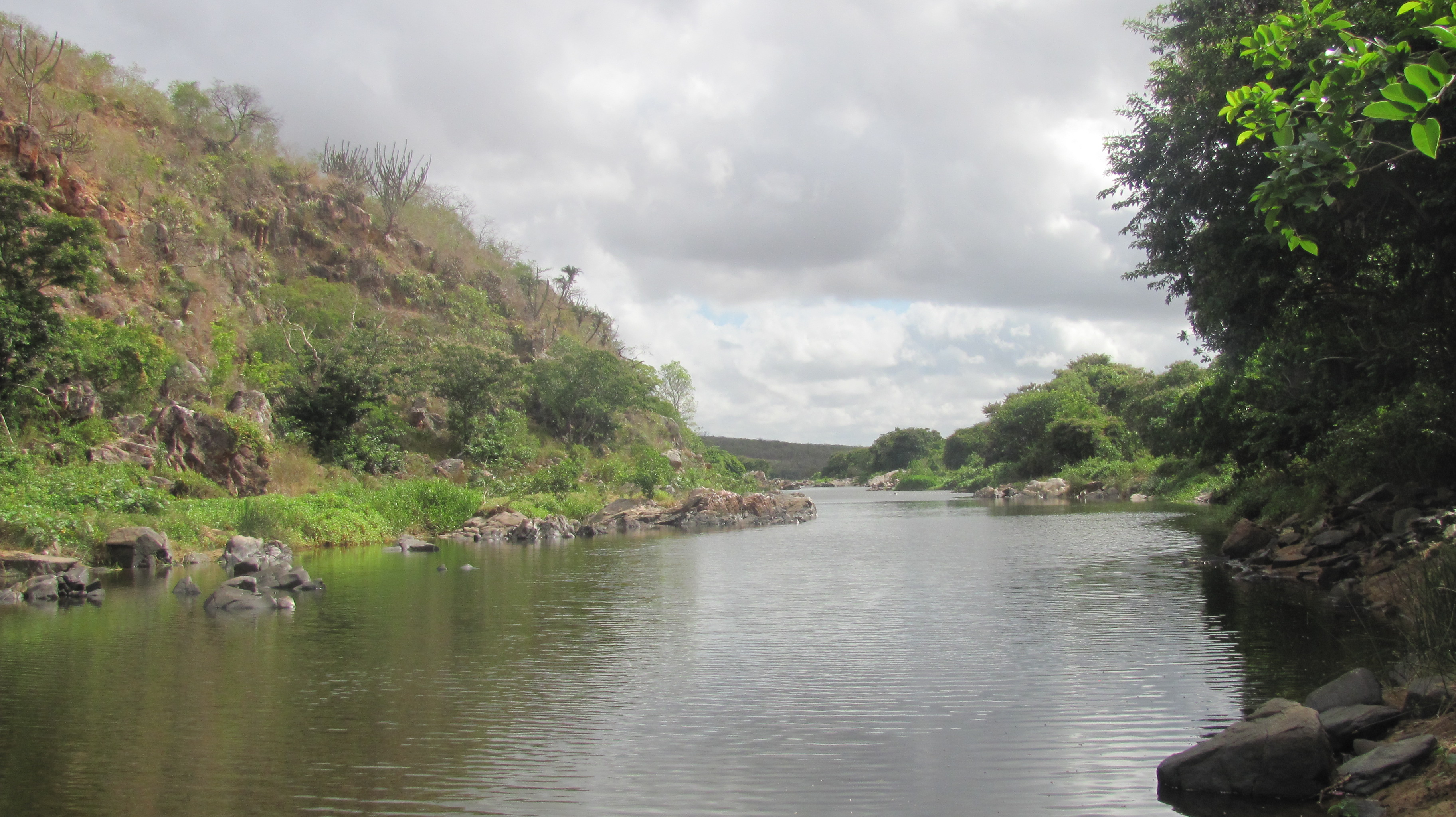 Rio Itapicuru no povoado de Barreira, município de Araci.